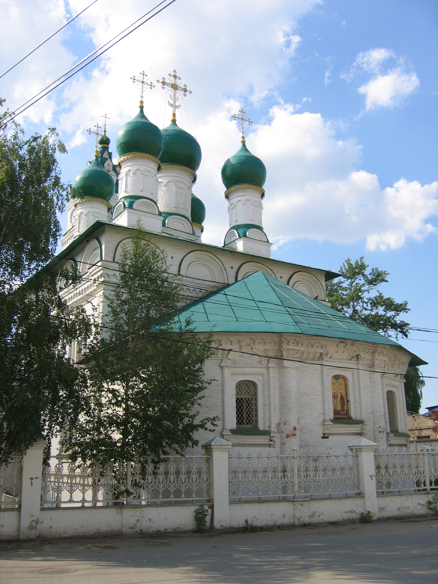 Церковь Благовещения в Туле